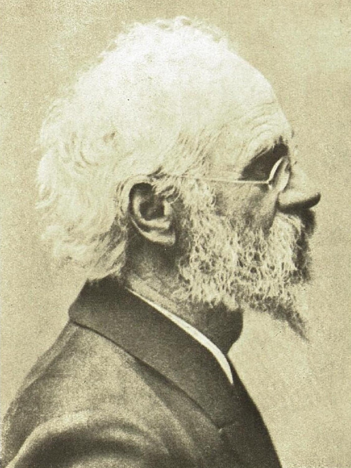 Bohumil Bouček (1850-1926), český lékař a zakladatel poděbradských lázní